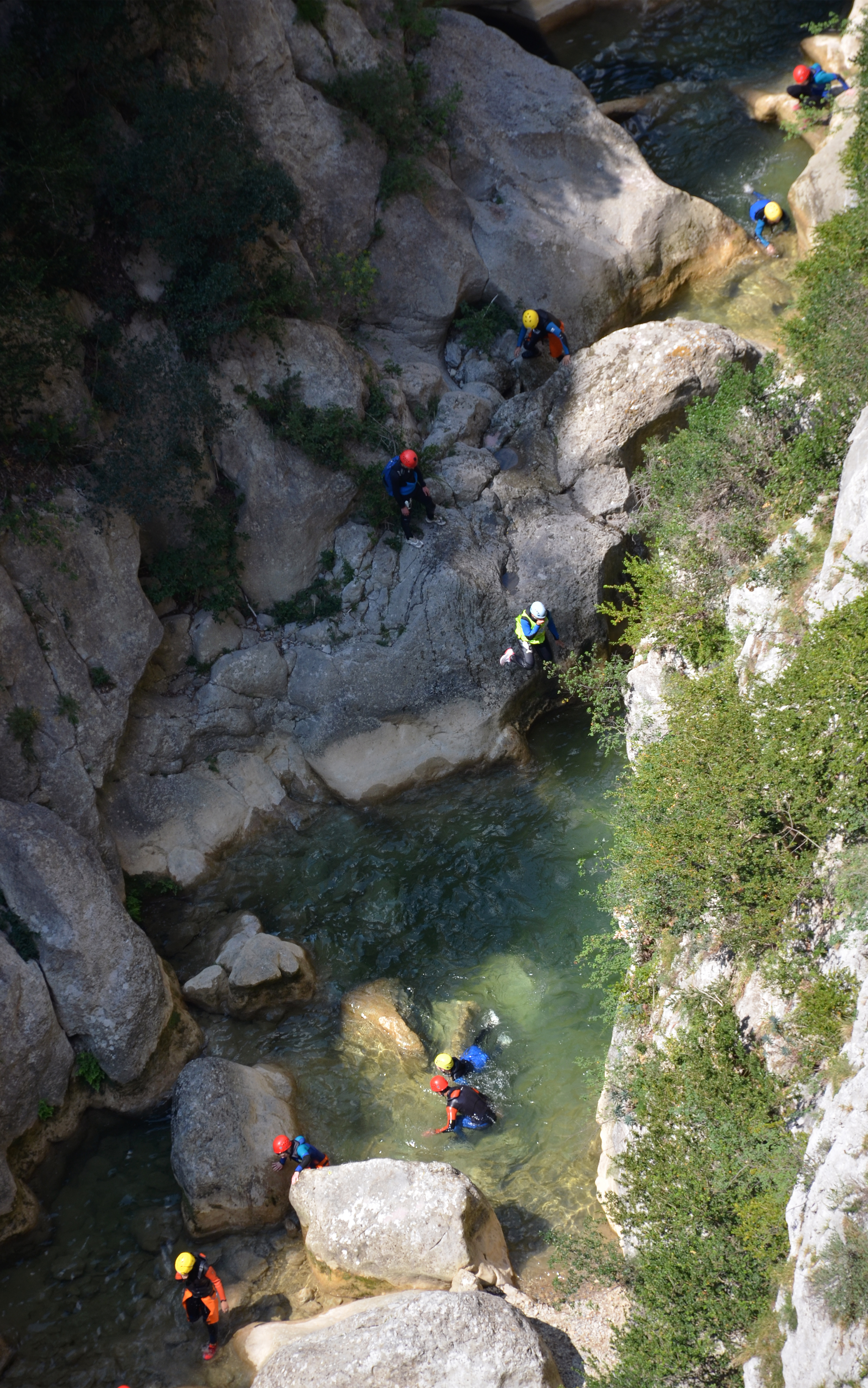 Canyonisme dans les gorges de Galamus.